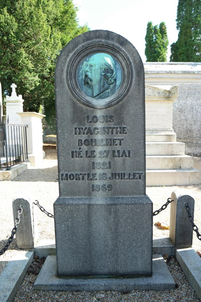 Grab des Dichters und Dramatikers Louis Hyacinthe Bouilhet, 1821-1869, auf dem Cimetière Monumental in Rouen